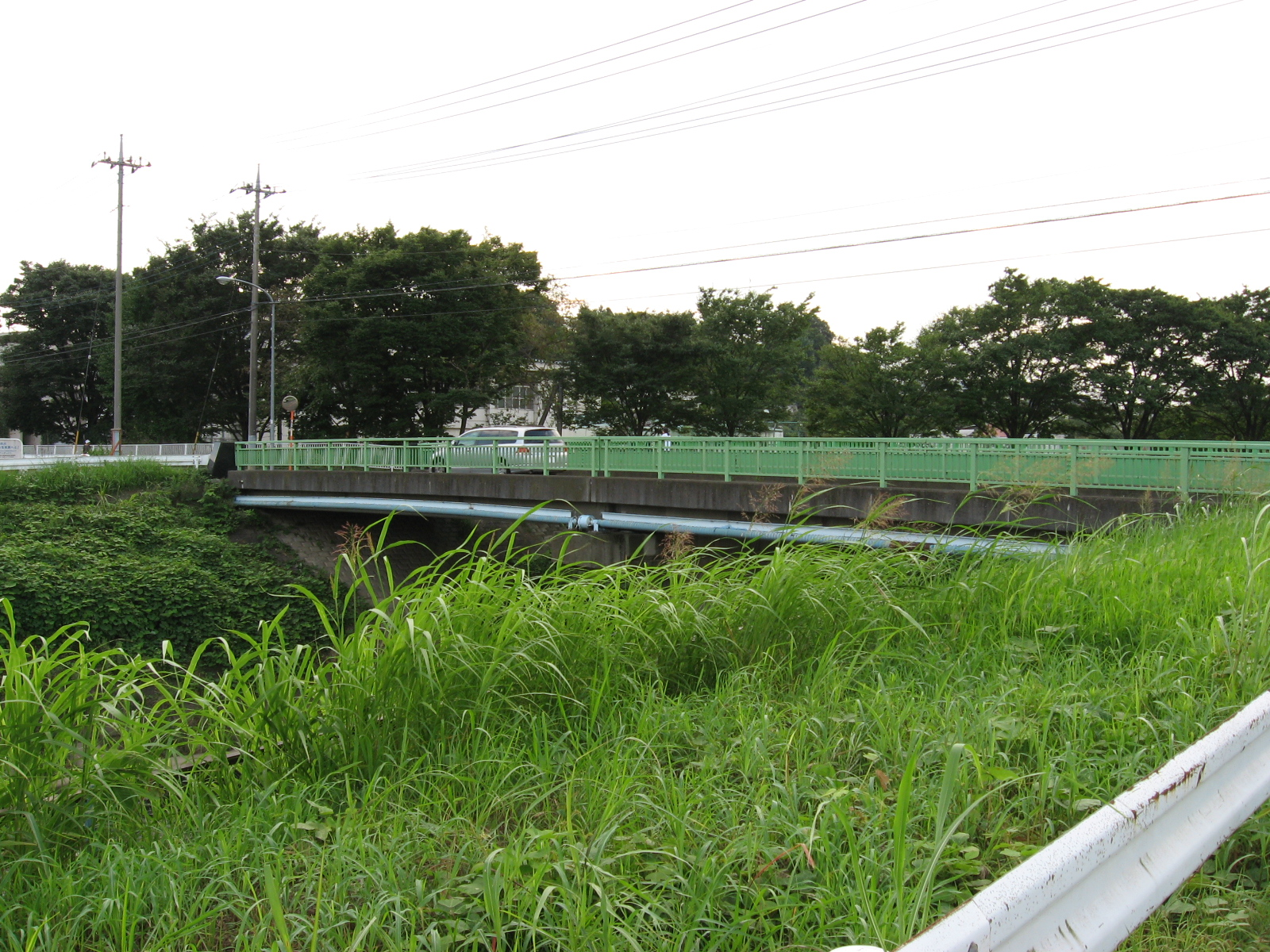 宮前橋